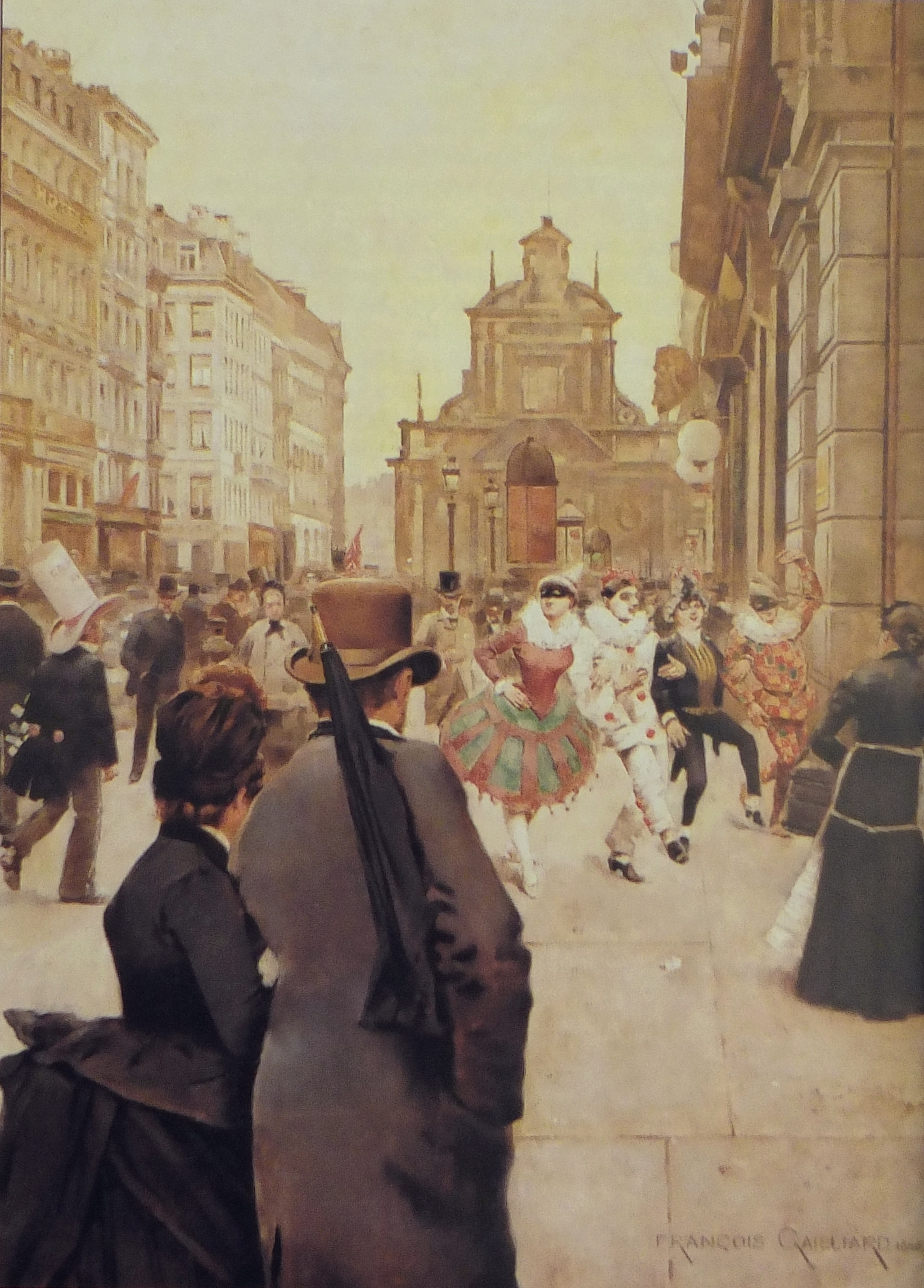 Carnaval sur les boulevards centraux